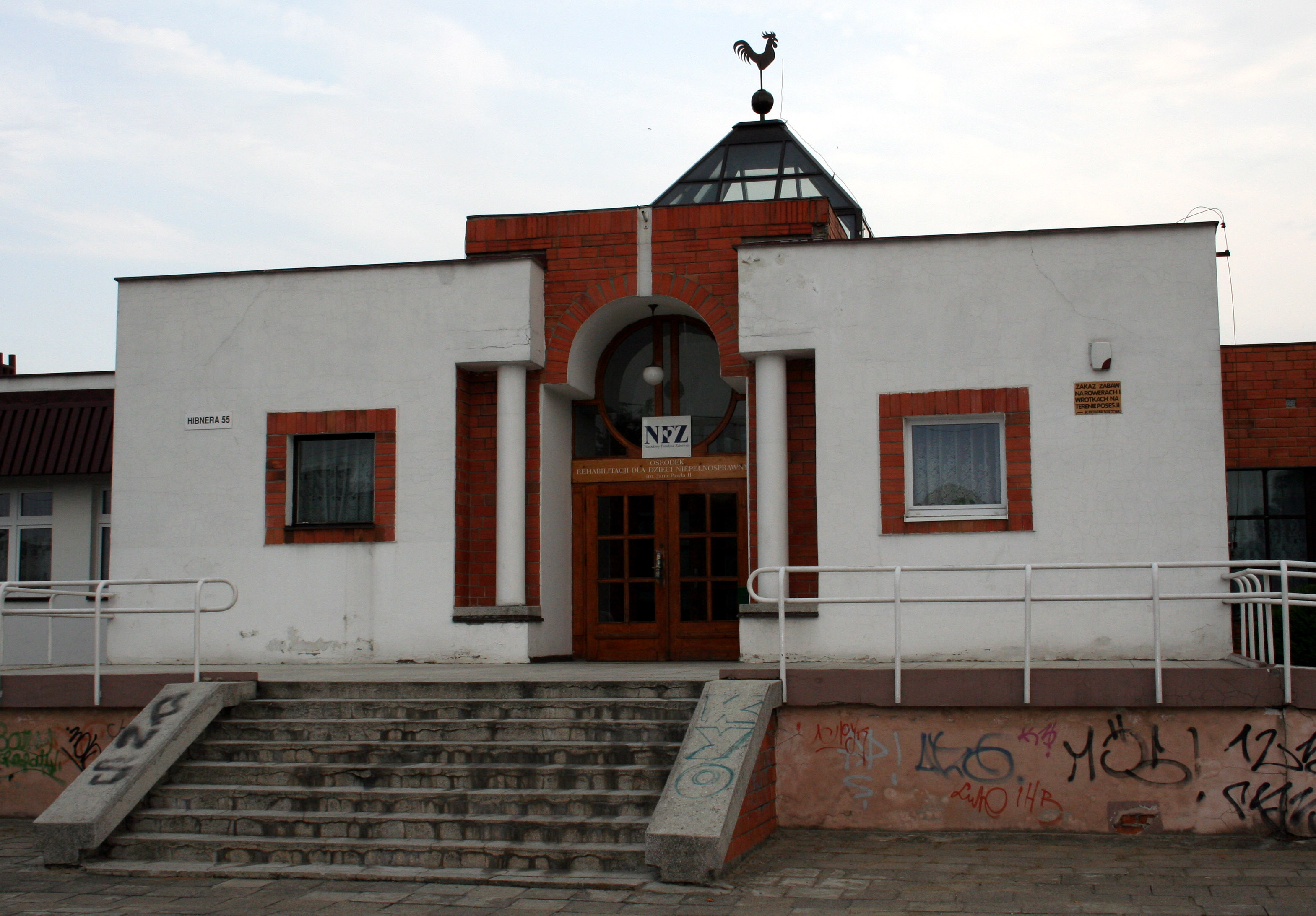 Rybnik Nowiny, ośrodek dla niepełnosprawnych dzieci im Jana Pawła II